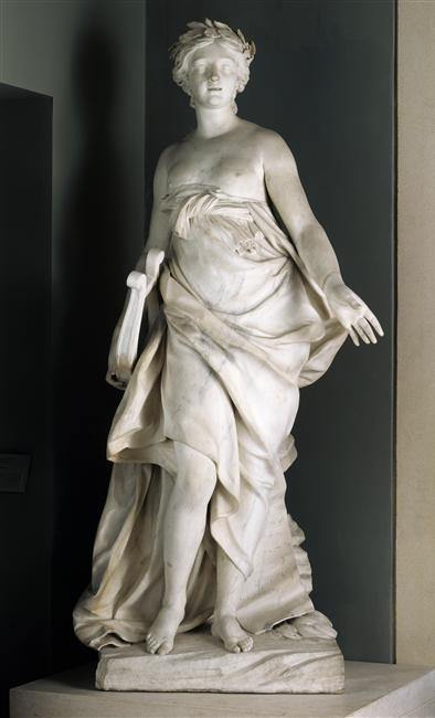 La Musique, de Falconnet. Sculpture placée dans le vestibule de Bellevue.